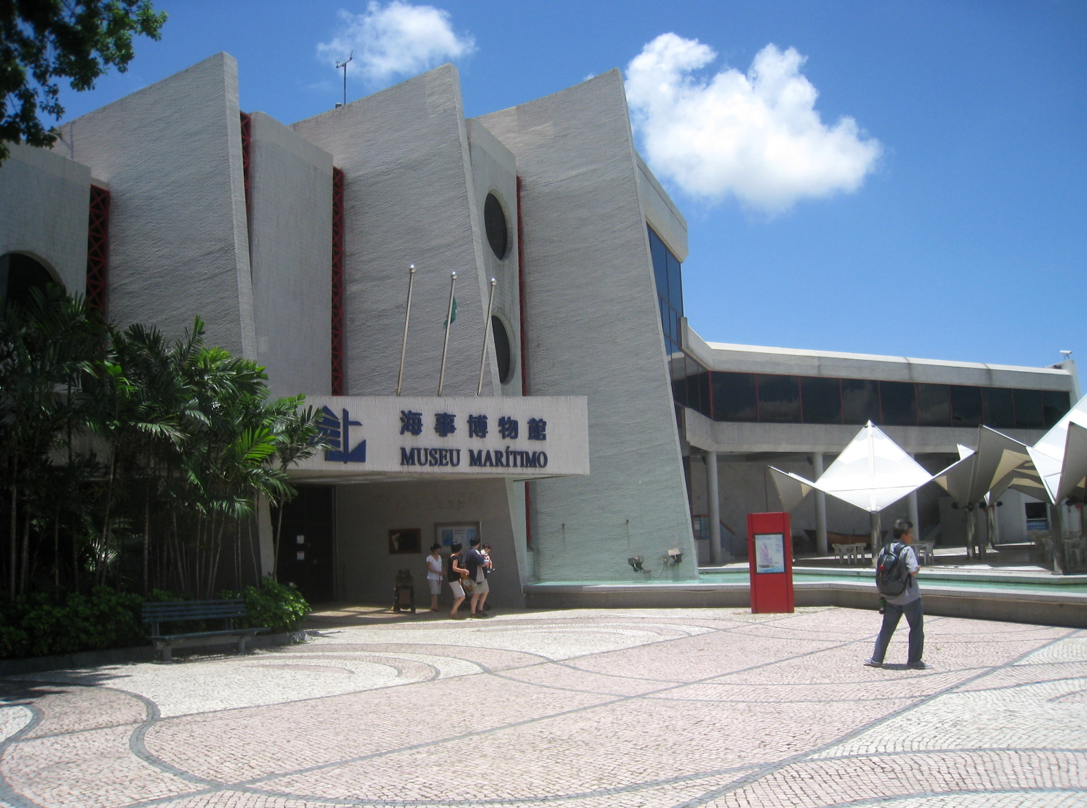 Museu Marítimo Macau 海事博物館 (澳門)